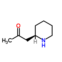 chemical structure of pelletierine